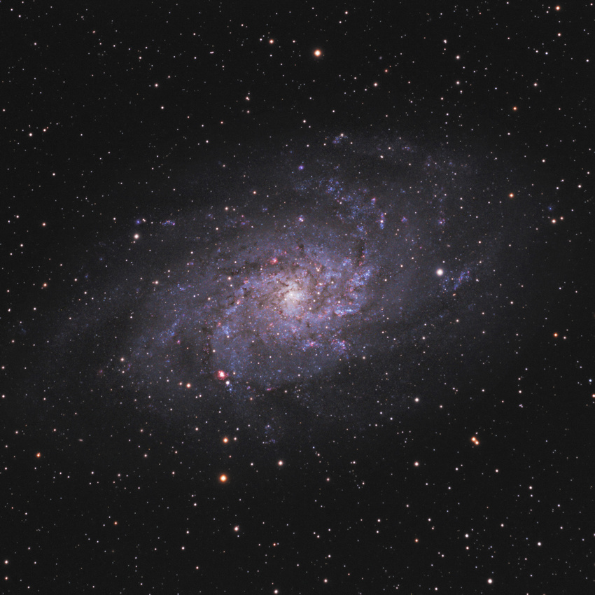 Messier 33, Triangulum Galaxy